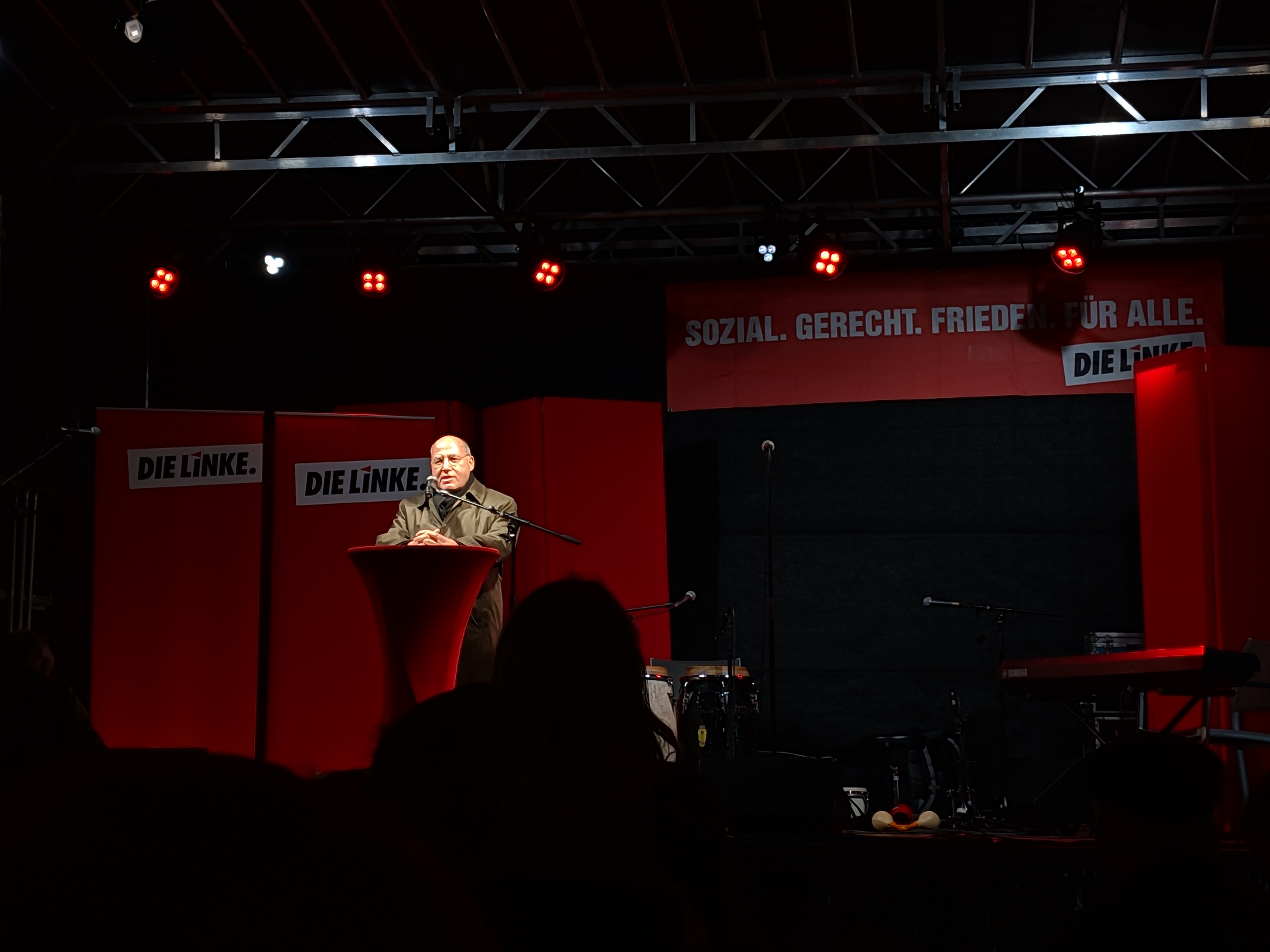 Gregor Gysi bei einer Rede zur Landtagswahl 2018 in Hessen auf einer Bühne in Wiesbaden